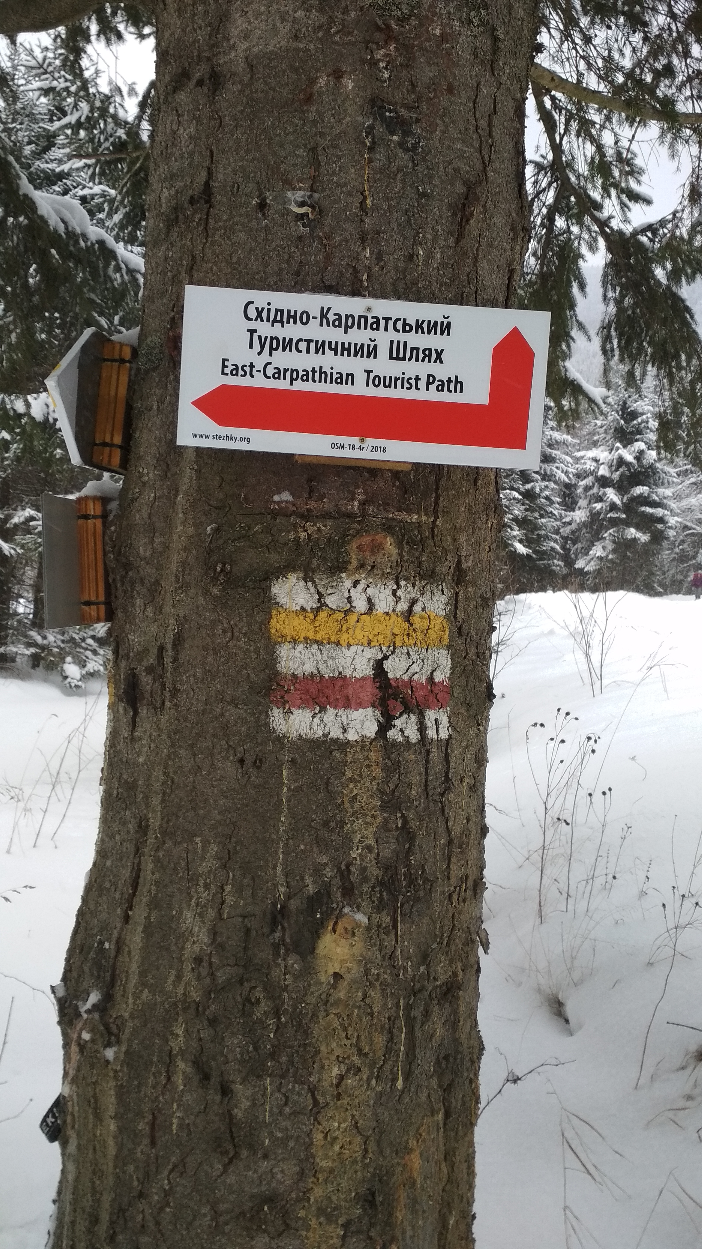 ур. Кругла